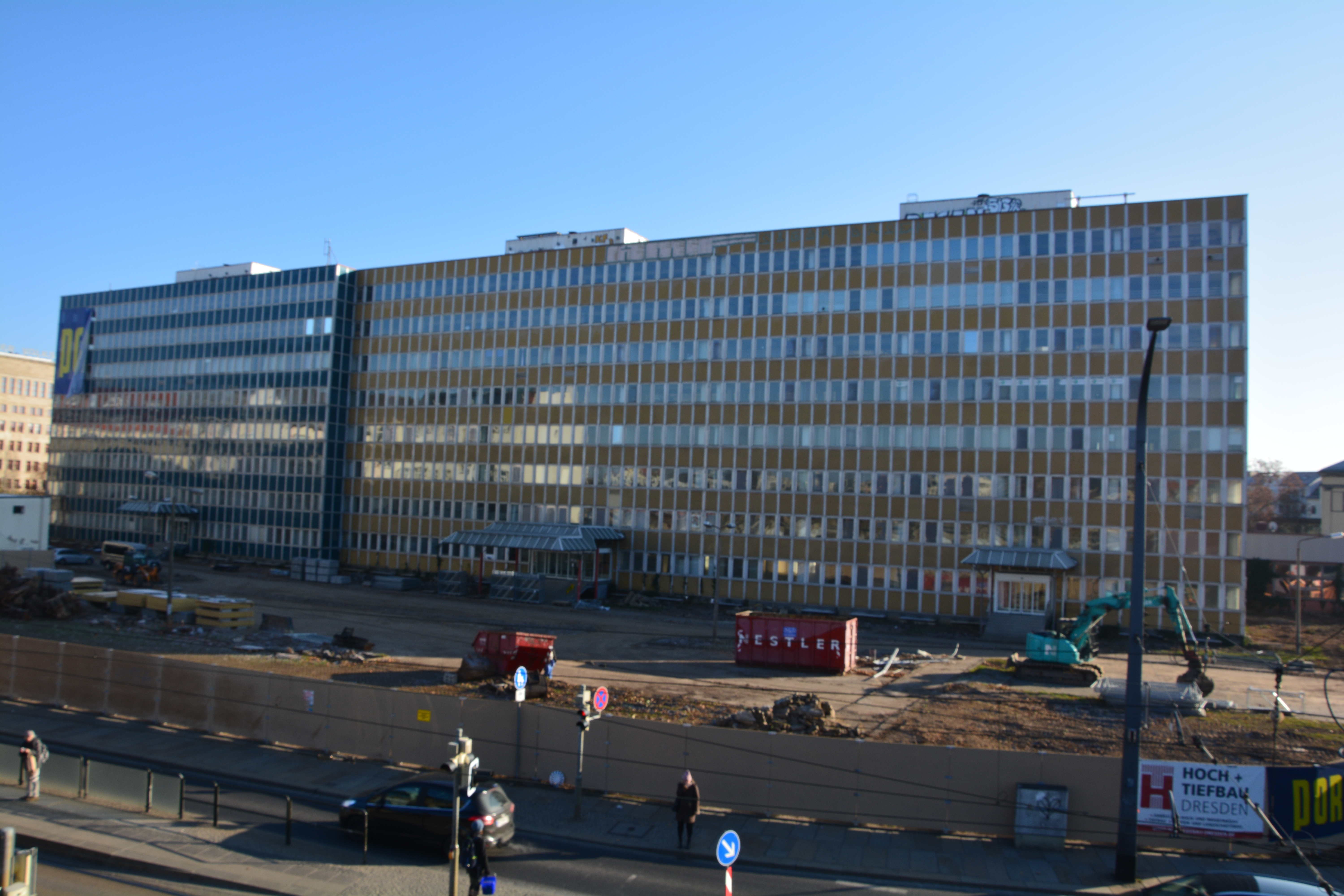 Achtgeschossiges Bürohochhaus mit gelb-blauer Fassade, gebaut in den 1980er Jahren für Energiebau Radebeul; 1988 Sitz des VEB Energiebau (Direktion, Verwaltung, Projektierung)